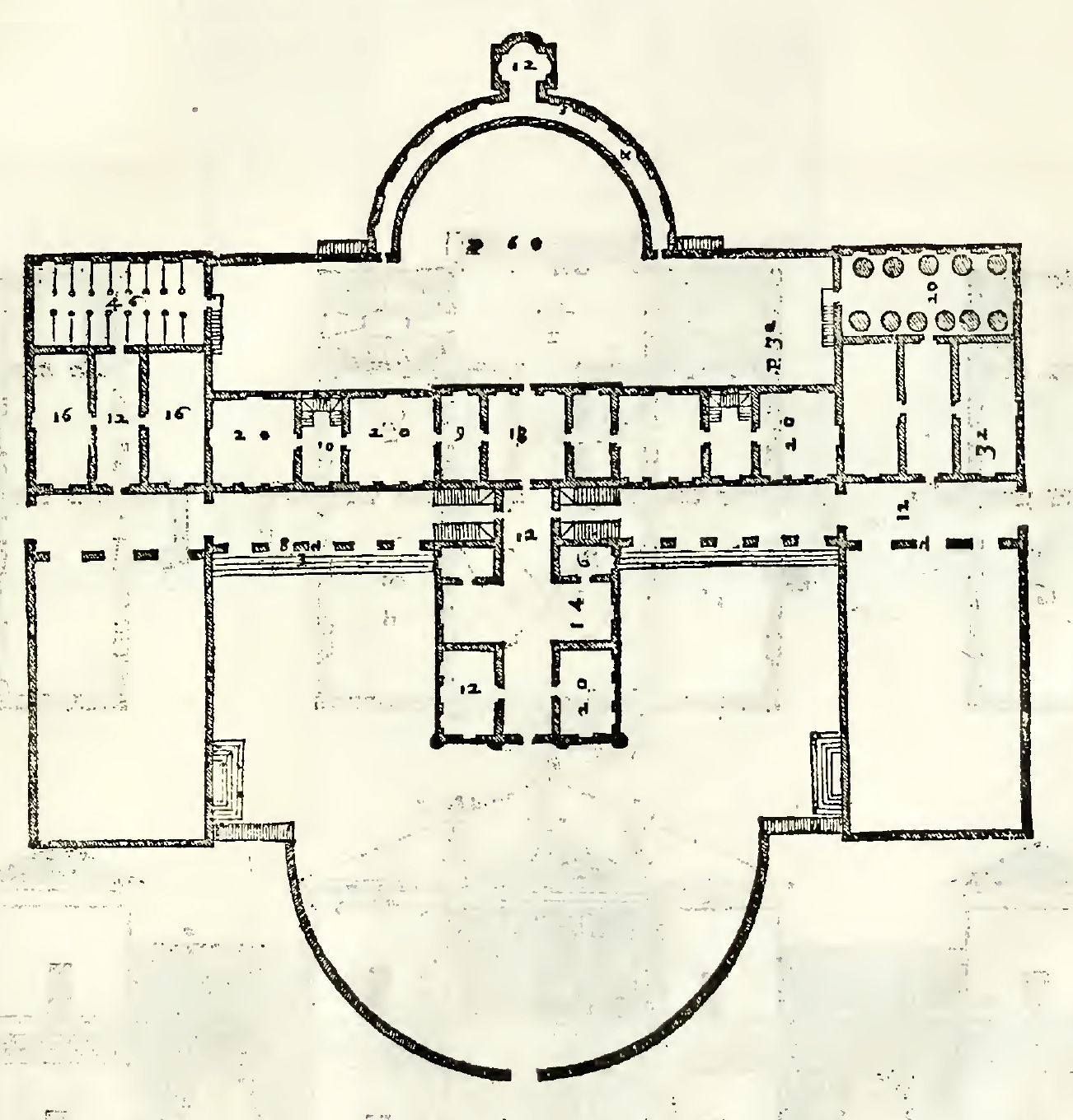 Pianta di villa Barbaro a Maser dal secondo libro dell'architettura di Andrea Palladio